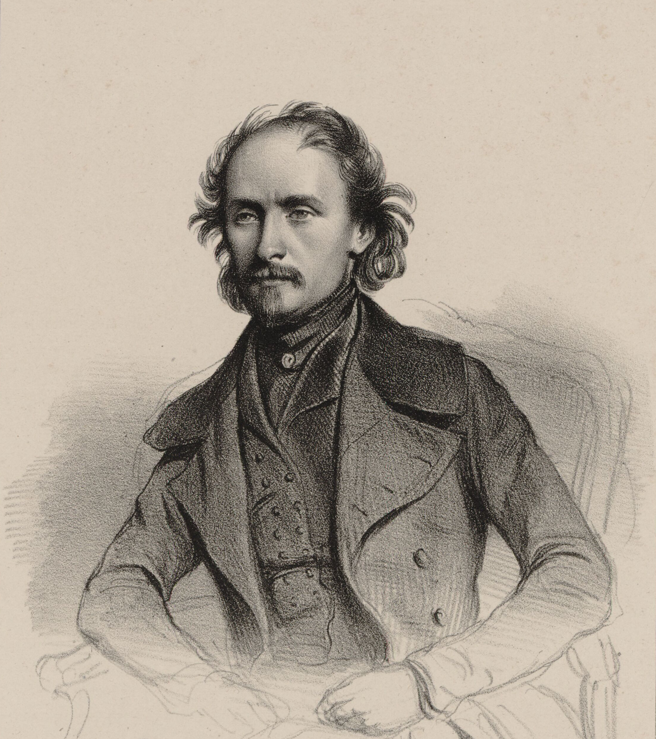 Henri Jérôme Bertini (1798-1876), composer